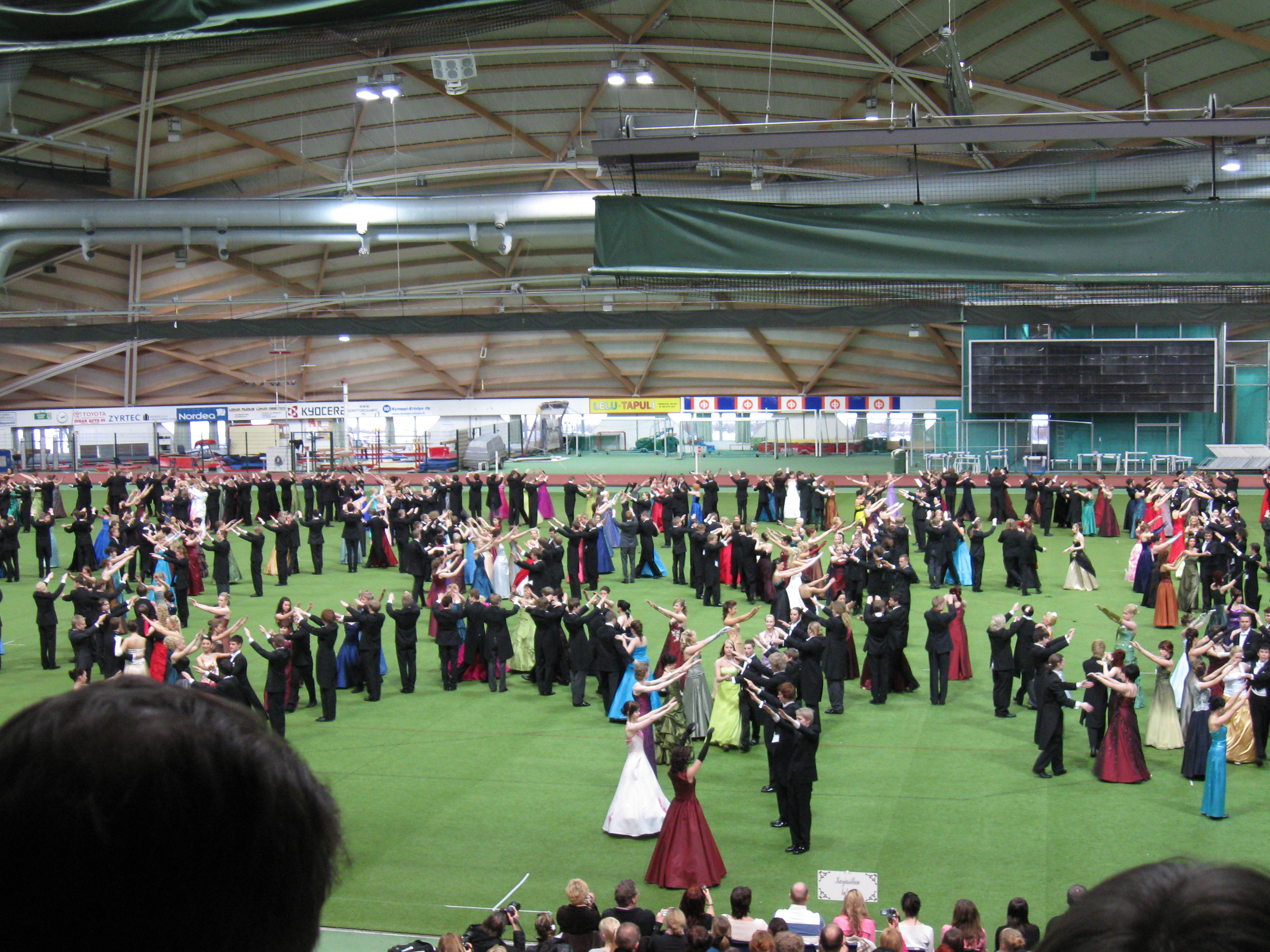 Vanhojen tanssit Ouluhallissa helmikuussa 2009.